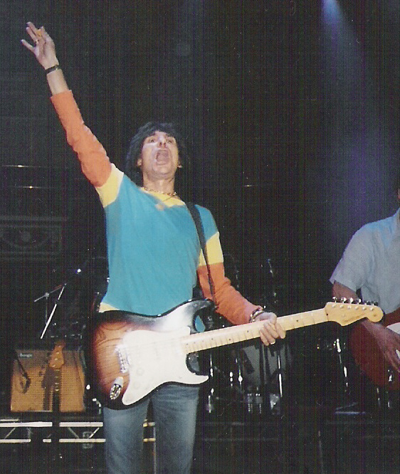 Ronnie Wood, Royal Albert Hall (London), 2004, Ronnie Lane Memorial Concert, zelf gemaakt met wegwerpcamera vanaf de eerste rij